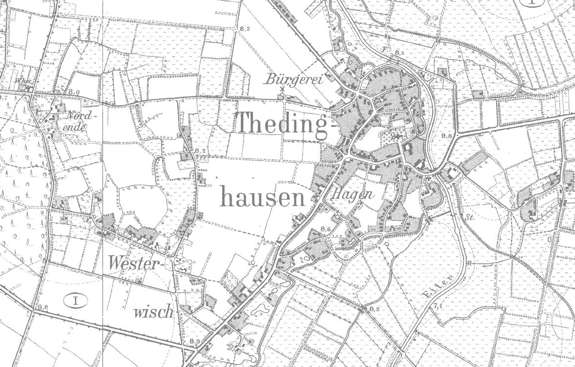 Karte Thedinghausen 1899